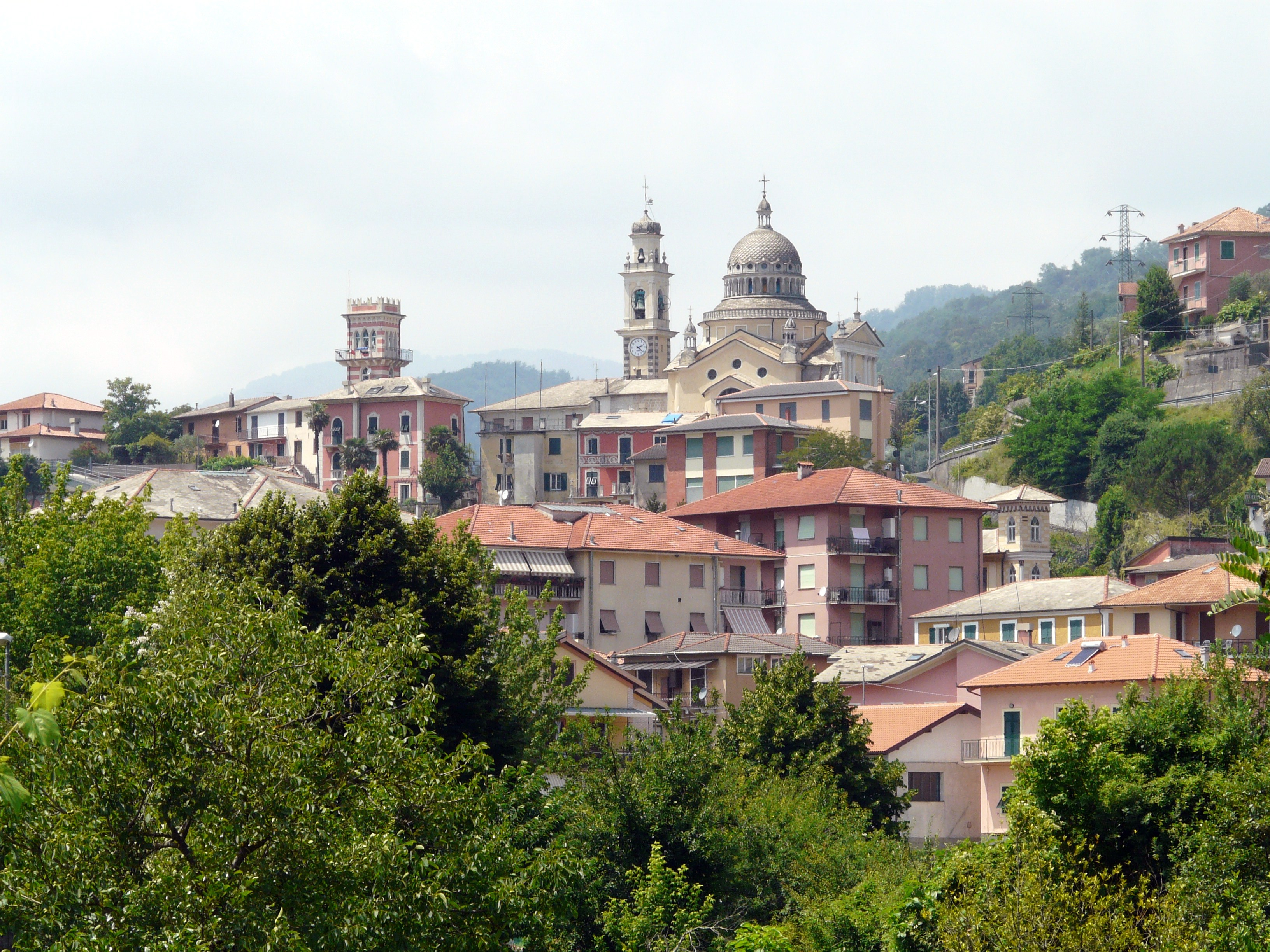 Panorama di Gattorna, Moconesi, Liguria, Italia